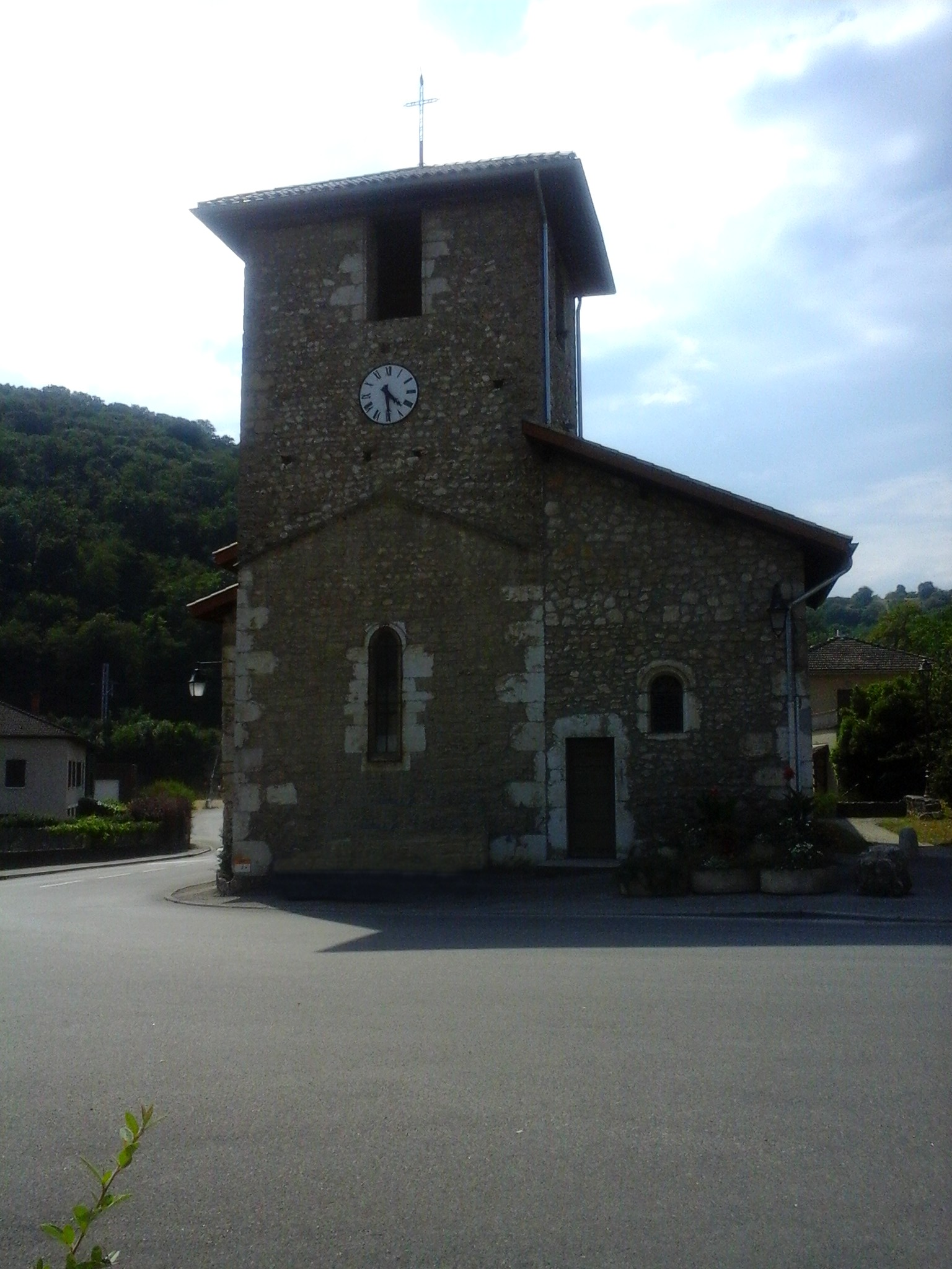 Poliénas, Isère, juillet 2015.